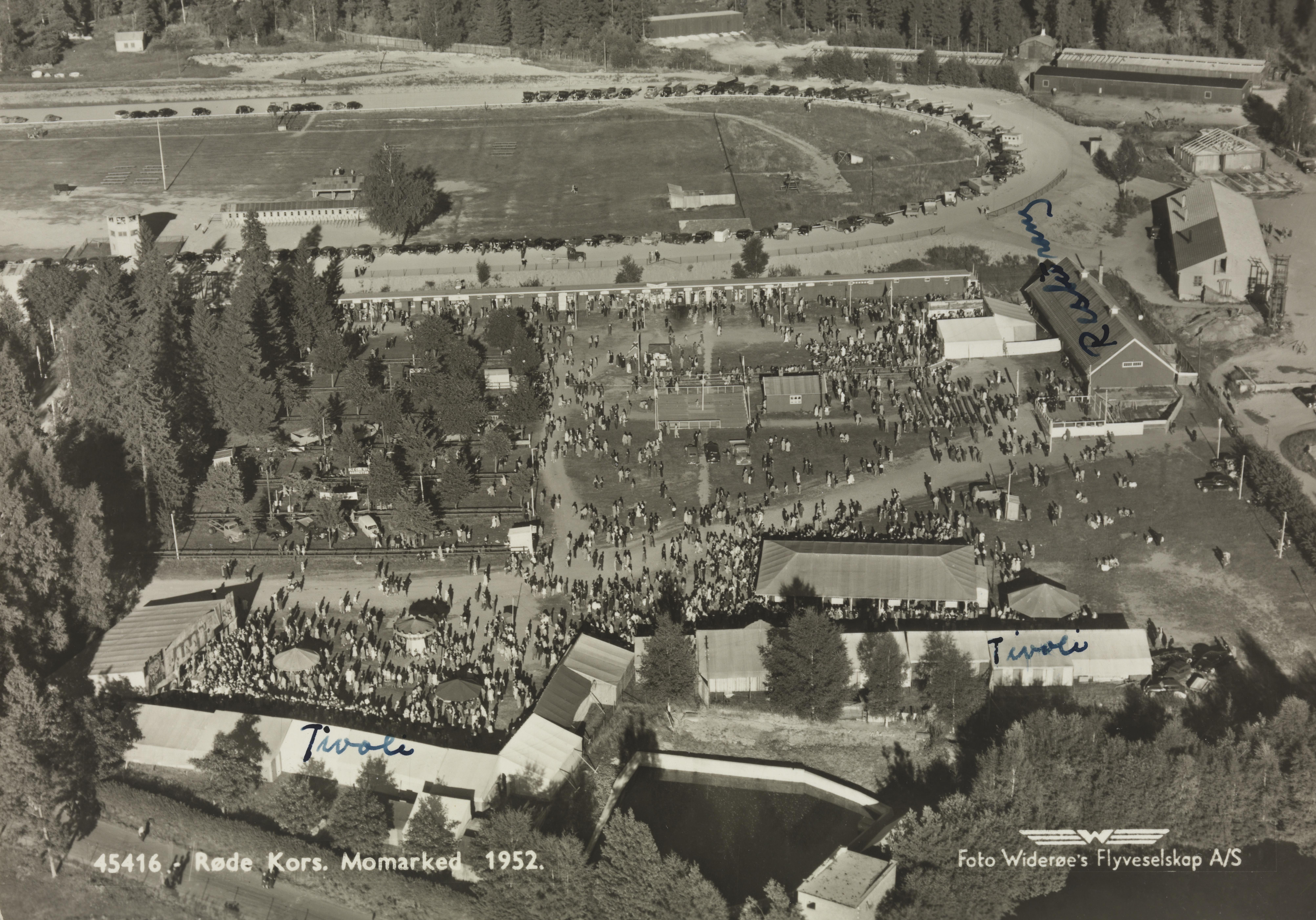 Momarkedet arrangert av Røde Kors, Mysen, 1952